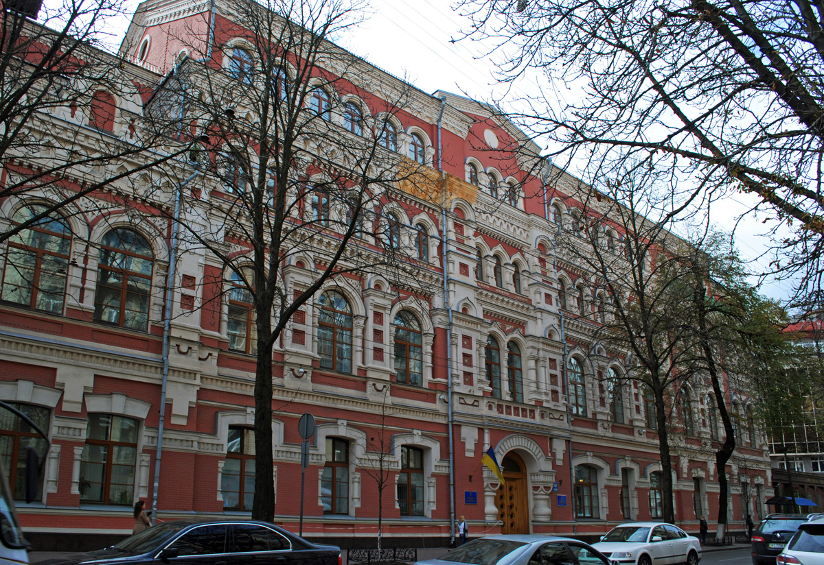 Будинок київського православного релігійно-освітнього товариства, в якому працювали Д. Богдашевський, М. Гросу, богослови, Київ, Велика Житомирська вул., 9